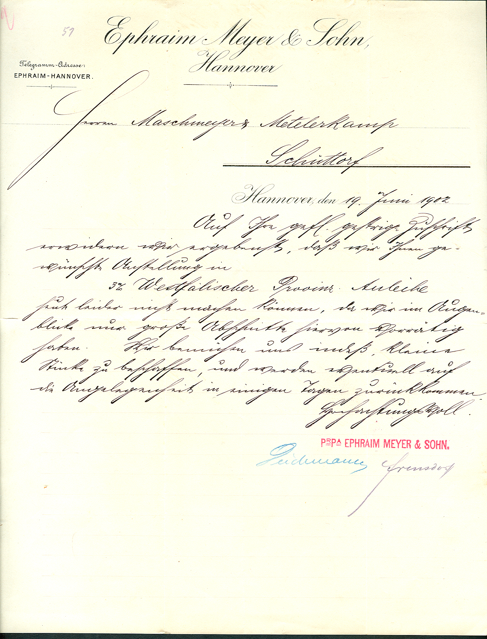 Schreiben vom 19. Juni 1902 auf Vordruck des Bankhauses Ephraim Meyer & Sohn in Hannover an "Maschmeyer, Metelerkamp, Schüttorf", Unterschrift der beiden Prokuristen Seidemannn (?) und Frensdorff (?). Das linierte Papier ist ohne Wasserzeichen und im Format etwas breiter als DIN A4 ...